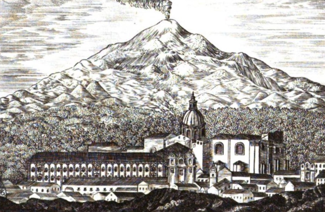 F. di Bartolo: Das Benediktinerkloster von Catania von Süden